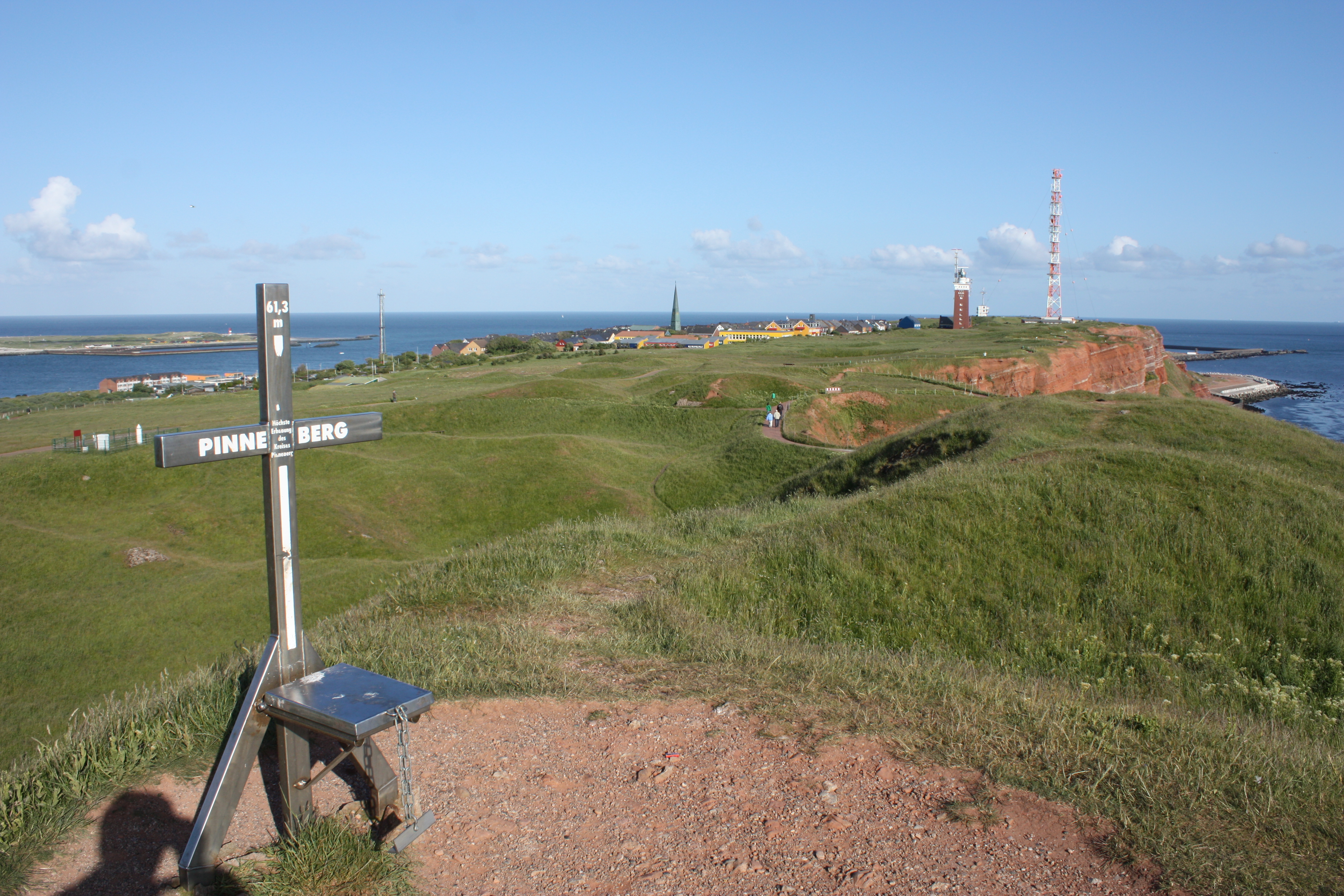 Heligoland Oberland, Helgoland Oberland